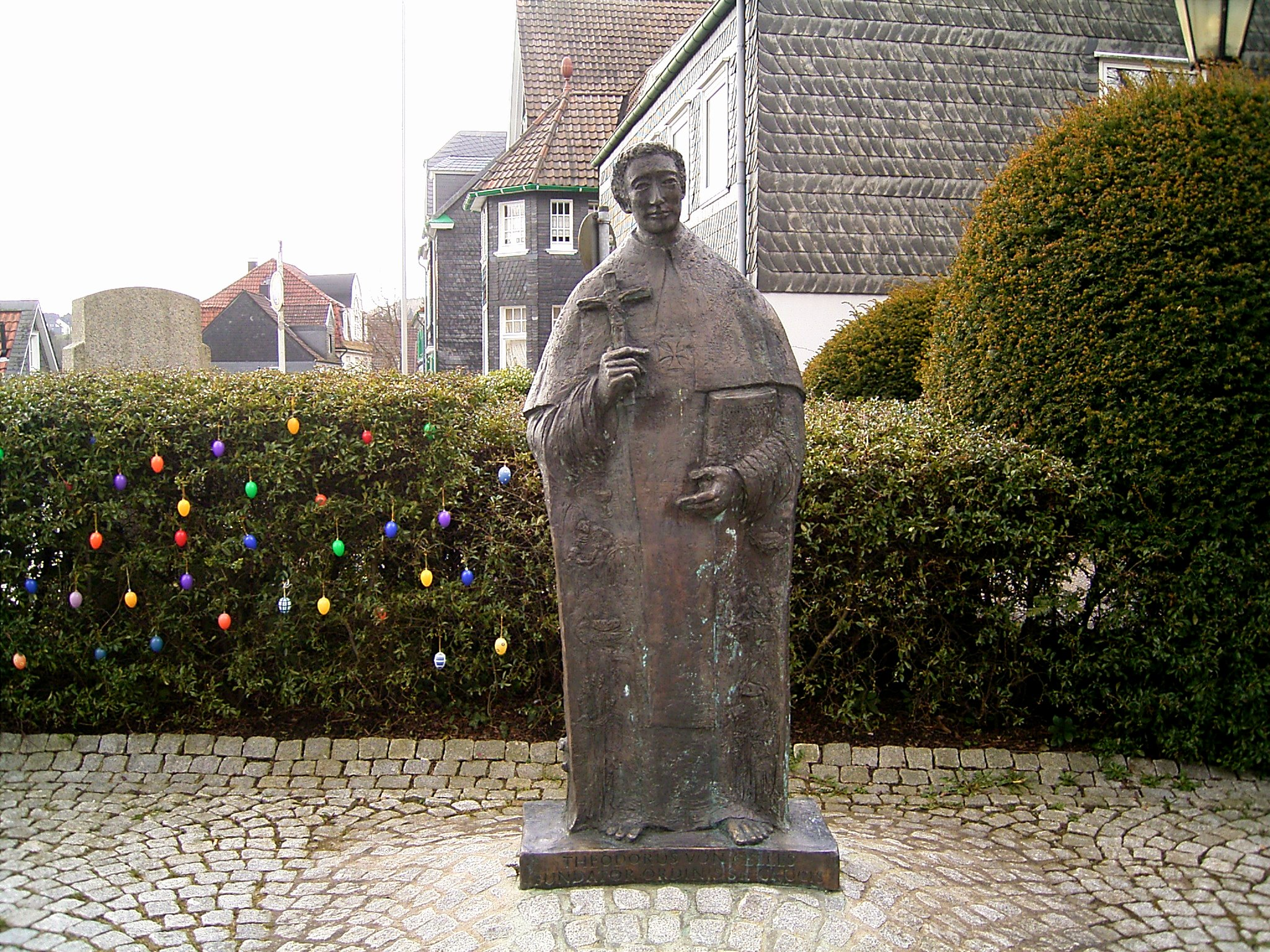 Klosterkirche in Wuppertal - Beyenburg